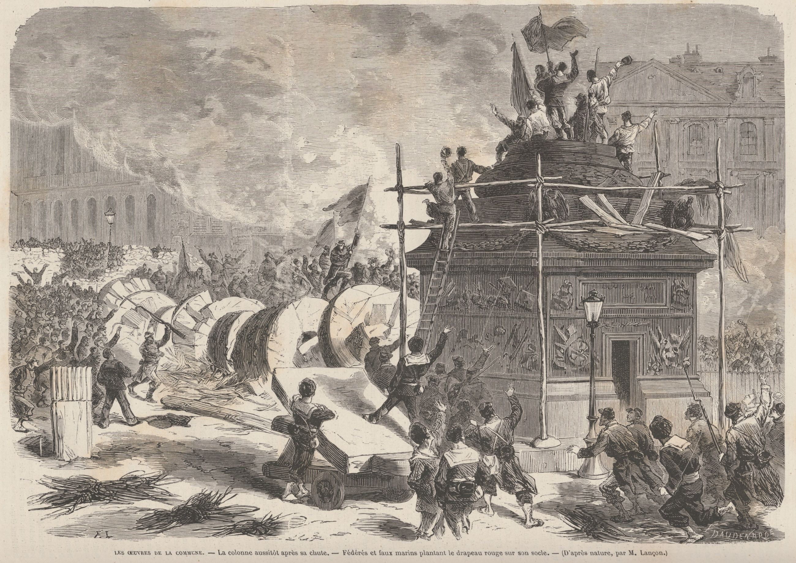 Les oeuvres de la Commune. — La colonne aussitôt après sa chute.— Fédérés et faux marines plantant le drapeau rouge sur son socle.— (D'après nature, par M. Lançon), en la revista Le Monde Illustré.